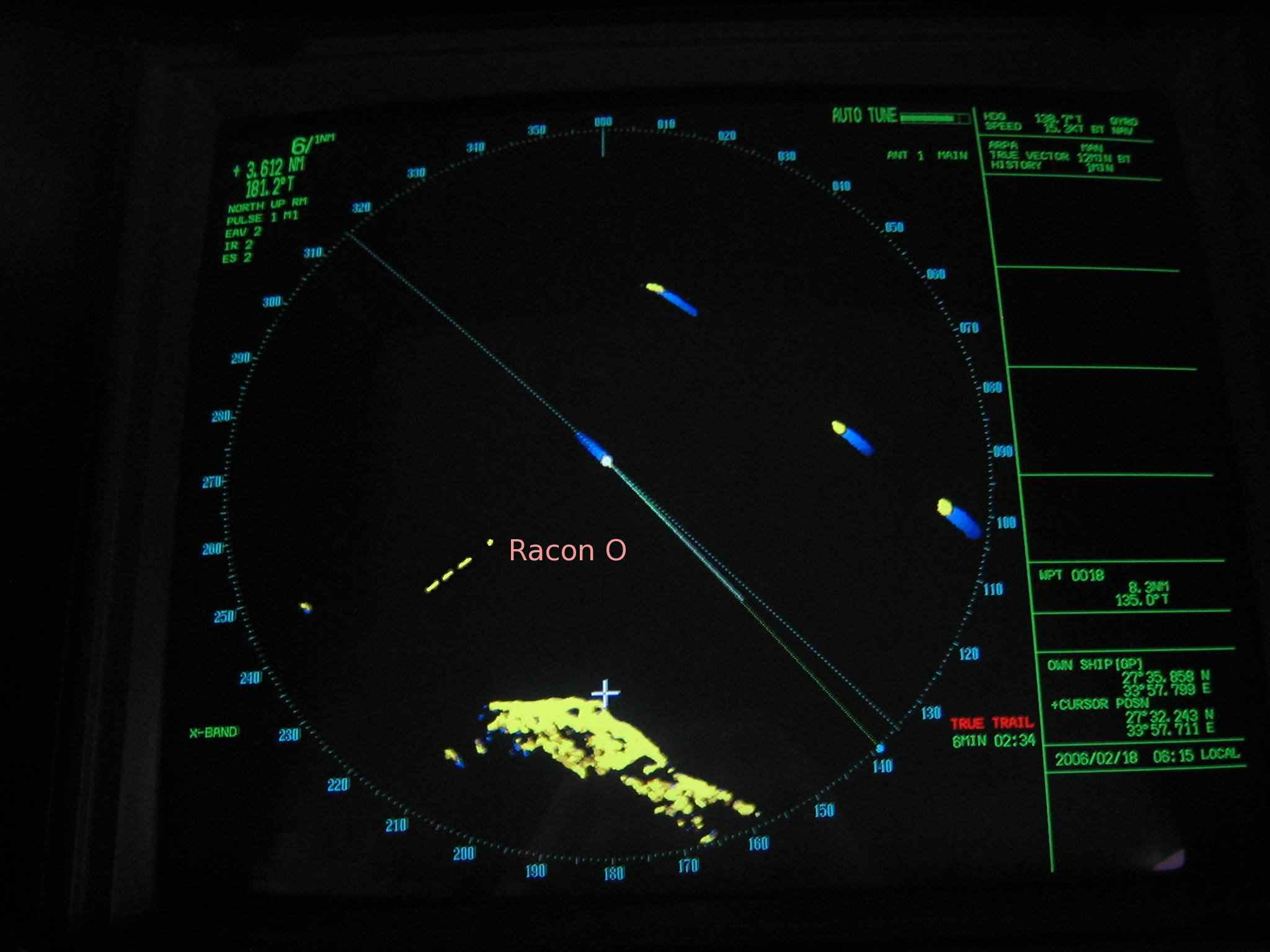 Racon element on screen Oscar (_ _ _)